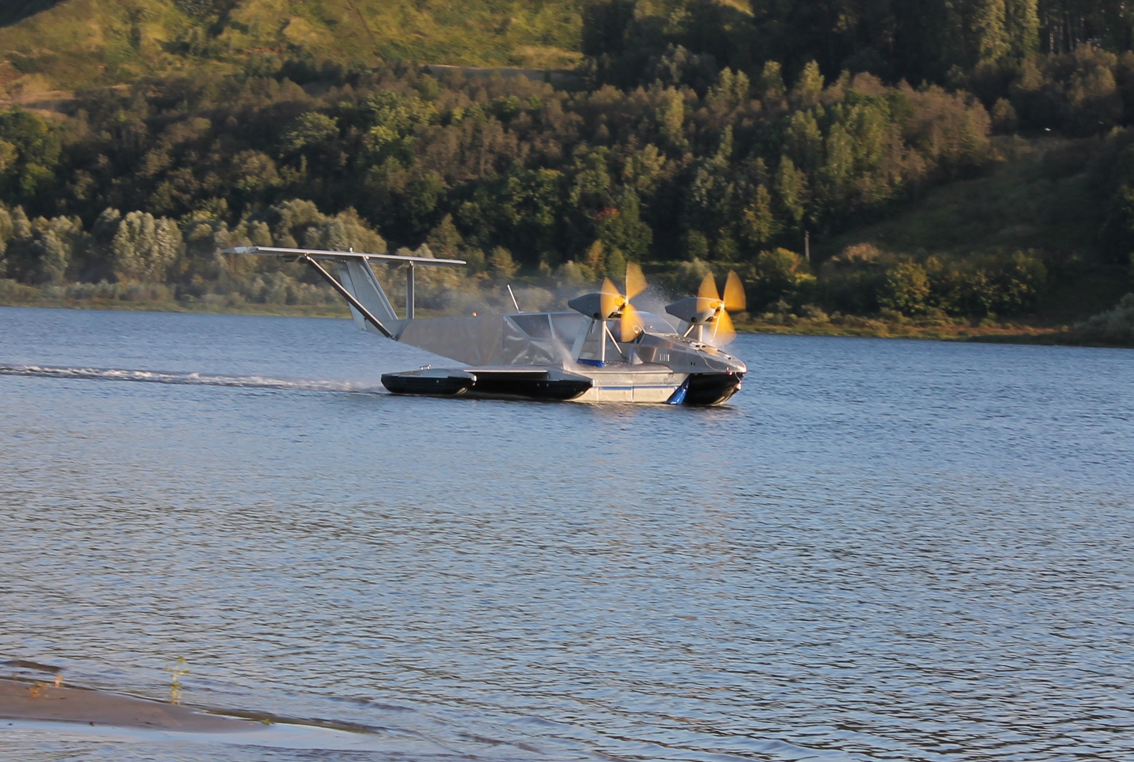 СВПАП Тунгус